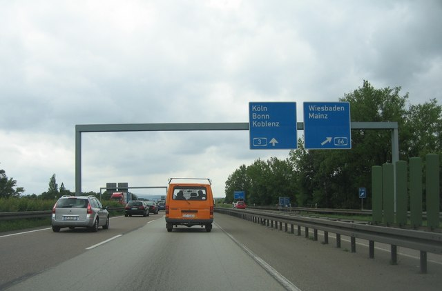 Autobahnkreuz A3/A66 bei Wiesbaden